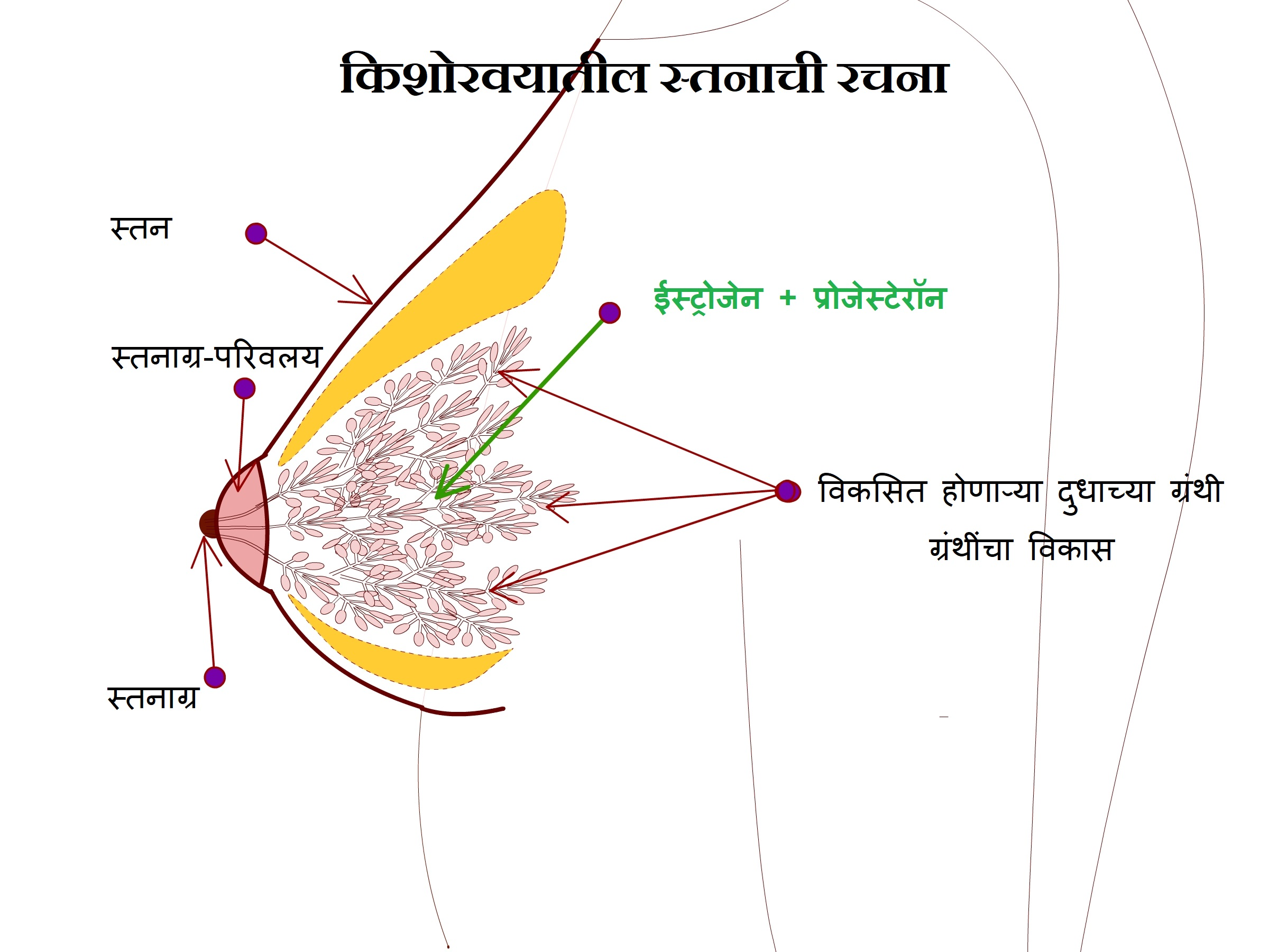 किशोरवयातील स्तनातील दुग्धग्रंथींचा विकास व रचना दाखवणारी योजनाबद्ध आकृती